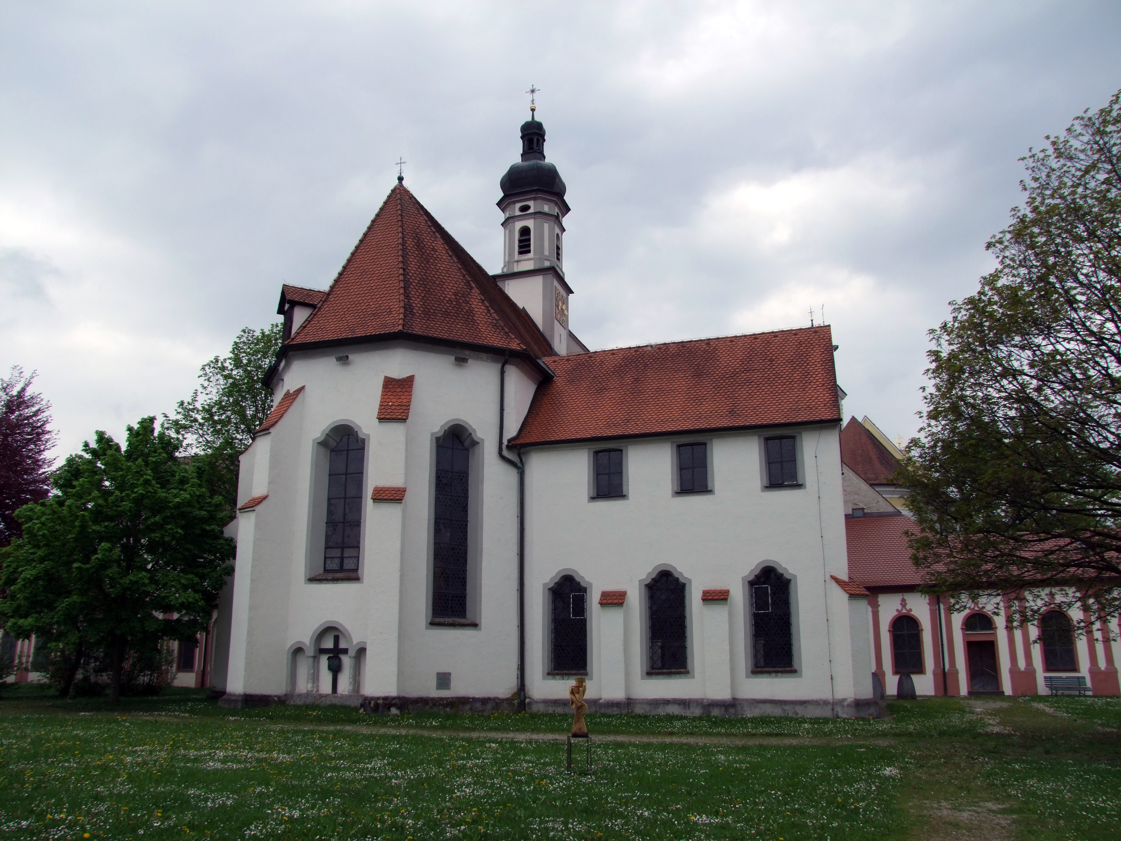 St. Maria vom Klosterinnenhof aus fotografiert.